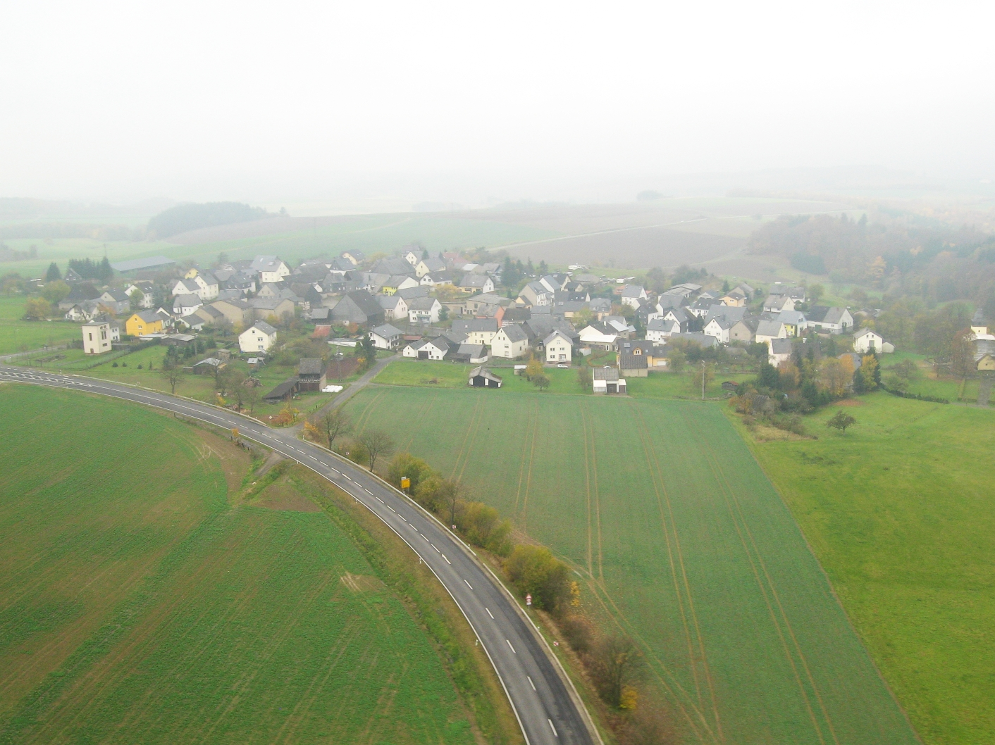 Hahn im Hunsrück, Sicht von Osten